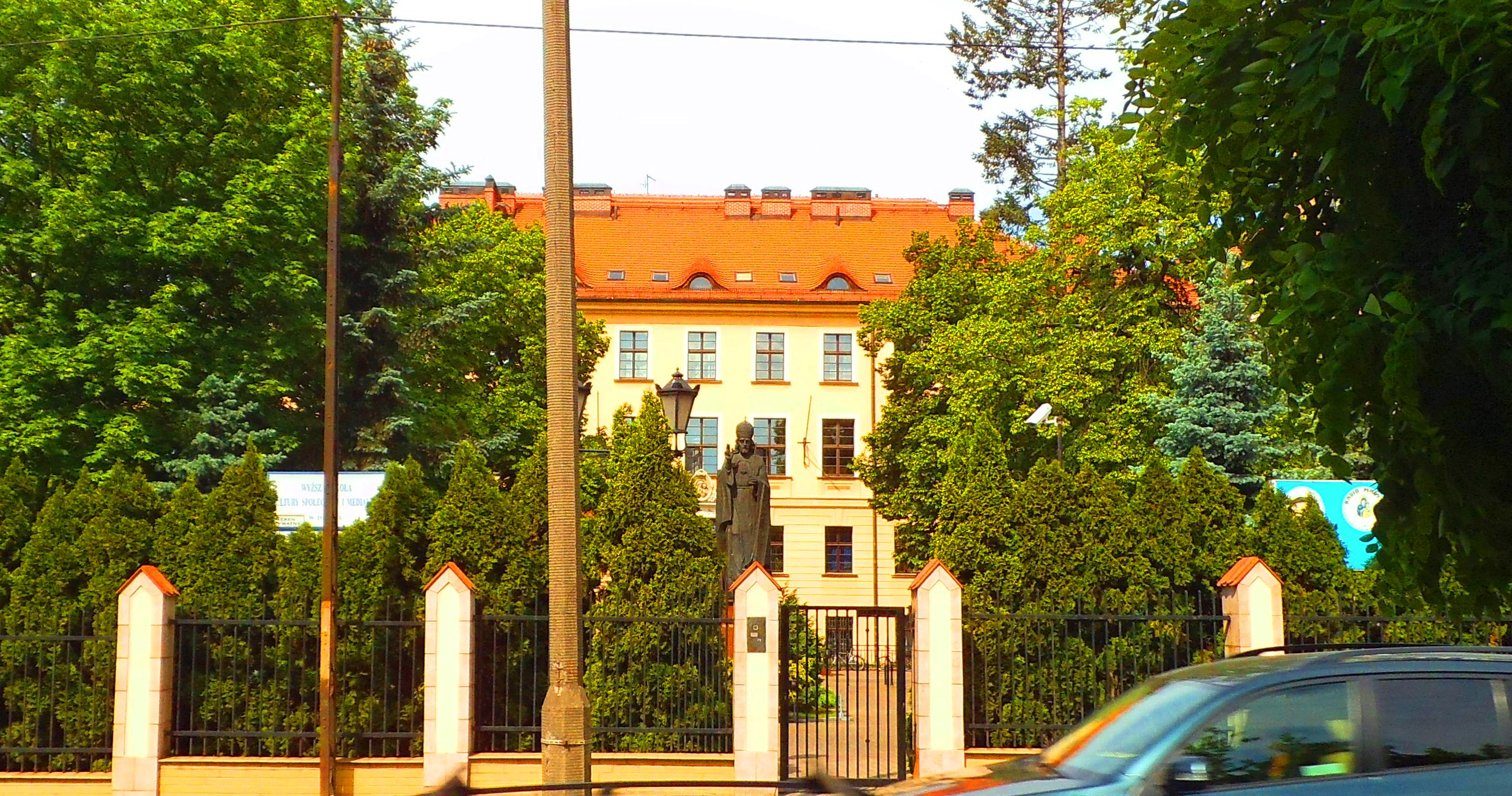 Rektorat Wyższej Szkoły Kultury Społecznej i Medialnej